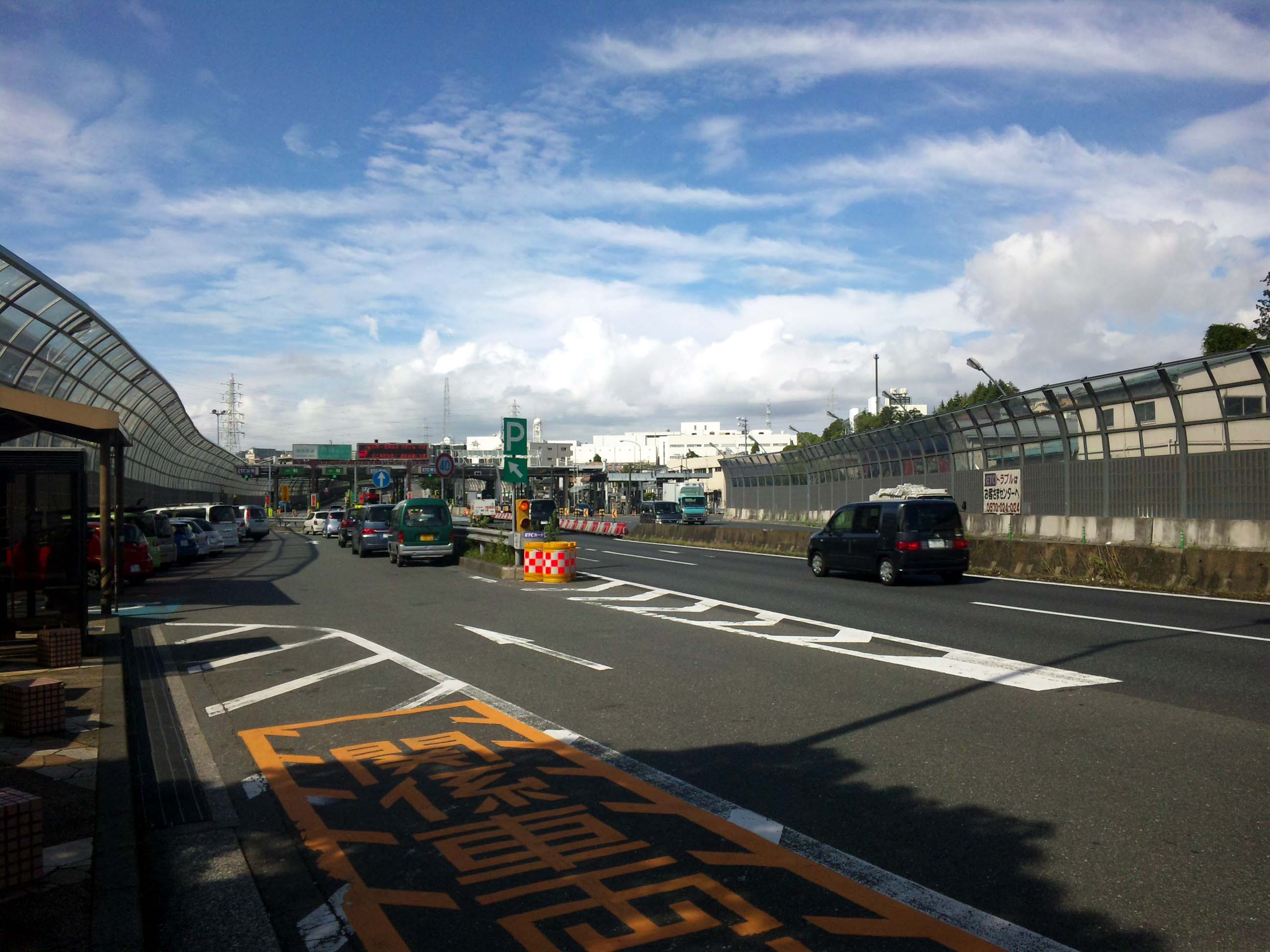 横浜新道ja:戸塚料金所NTTドコモSH-02Bにて撮影